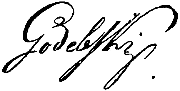 grafika z książki PL - Album biograficzne zasłużonych Polaków wieku XIX t.1 publikacja Marii Chełmońskiej Warszawa 1901